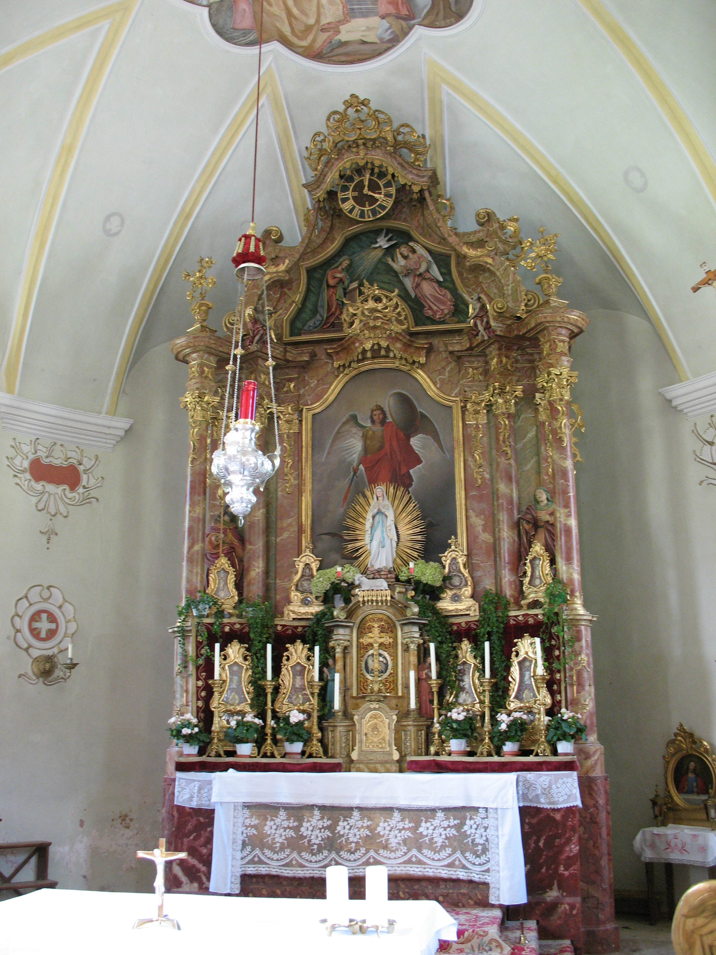 Kath. Pfarrkirche hl. Michael und Friedhof mit Kapelle